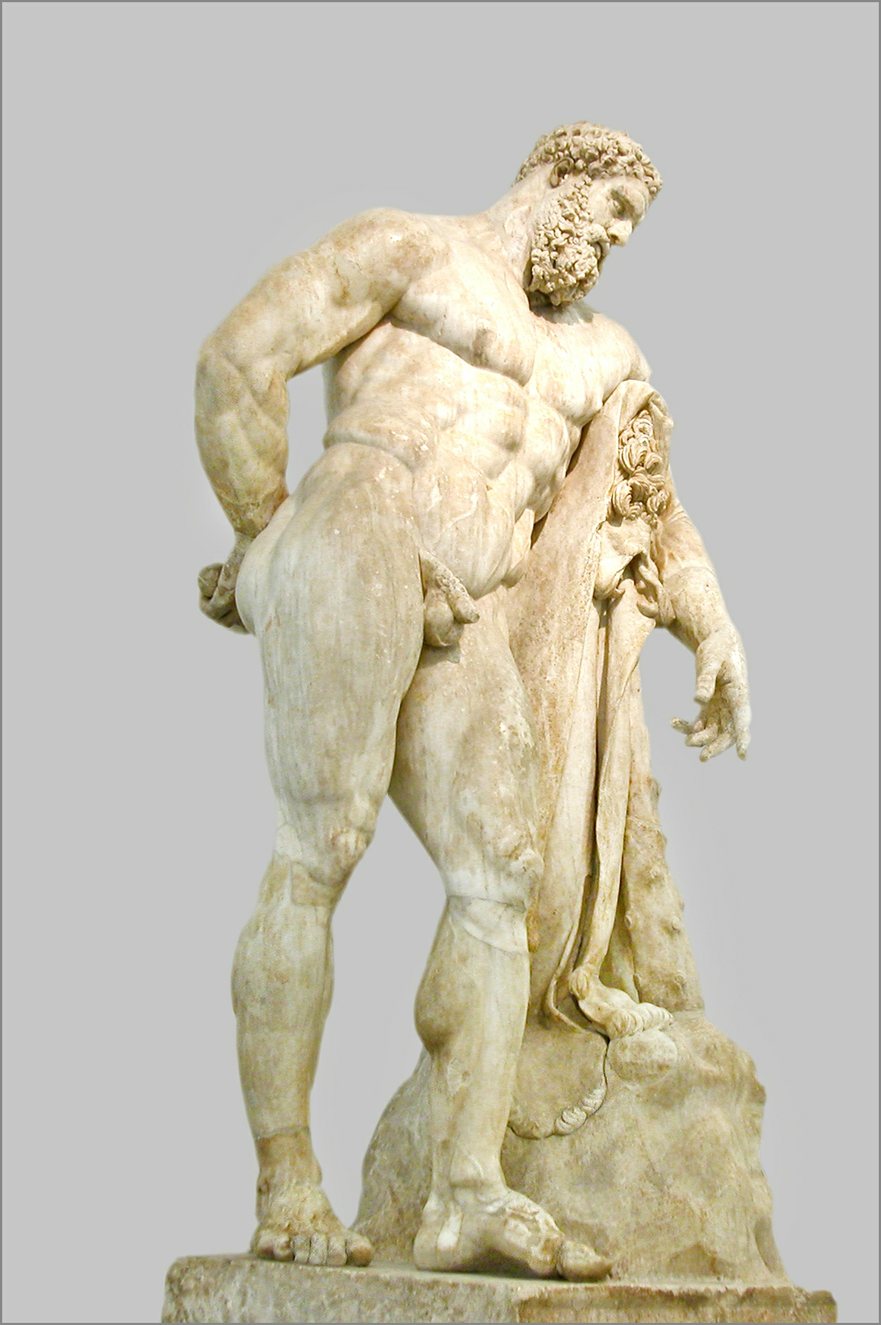 Hercule Farnèse (Photo prise en 2004 et retravaillée mais la définition des appareils de l'époque était moindre que celle d'aujourd'hui) musée archéologique national de Naples La statue a été exposée jusqu'en 1787 dans la cour du Palais Farnèse à Rome. Elle a été découverte dans l'aire des thermes de Caracalla au milieu du 16ème siècle. Elle a échappé aux pillages d’œuvres d'art organisés par Napoléon. Selon l'inscription gravée sur le rocher, elle est l’œuvre du sculpteur athénien Glycon, qui a fait une copie d'une œuvre de Lysippe de Sicyone, en bronze, représentant Hercule au repos, Hercule, appuyé sur sa massue recouverte de la peau de lion (ses attributs), vient de cueillir les pommes d'or du jardin des Hespérides qu'il tient dans la main droite (en fait, des oranges selon certains historiens) Site de l'auteur sur Paestum et Naples Article de Wikipedia sur l'Hercule Farnese